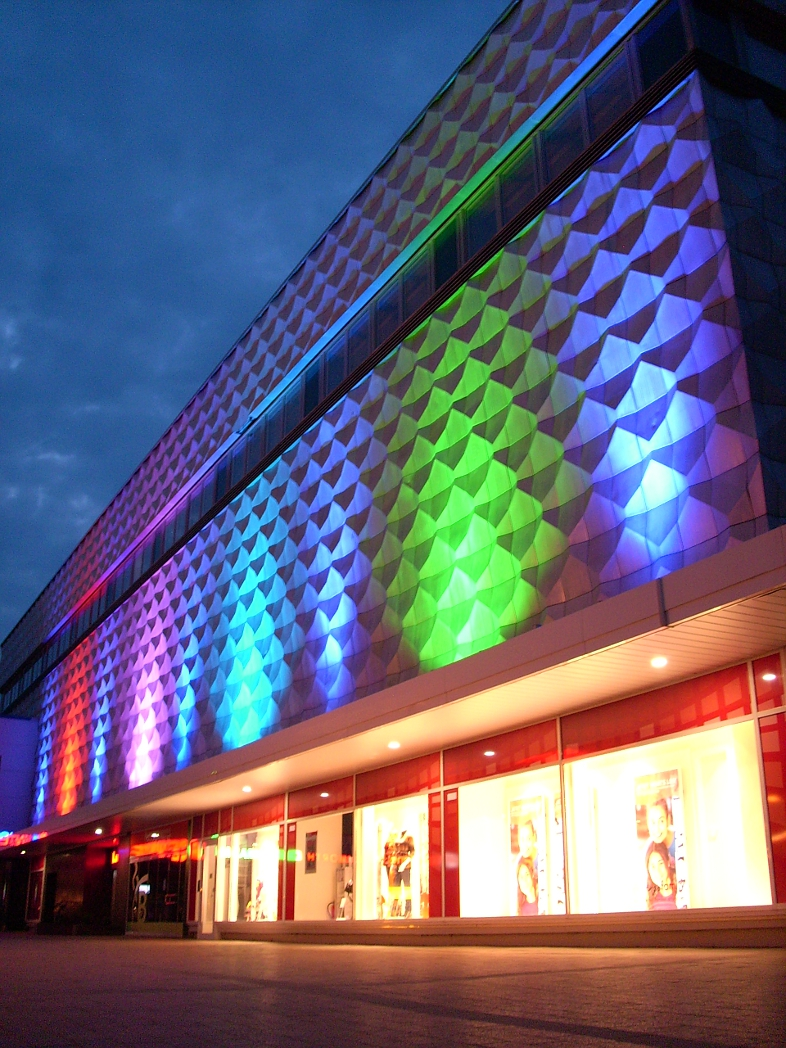 Warenhaus im Stadtzentrum von Hoyerswerda